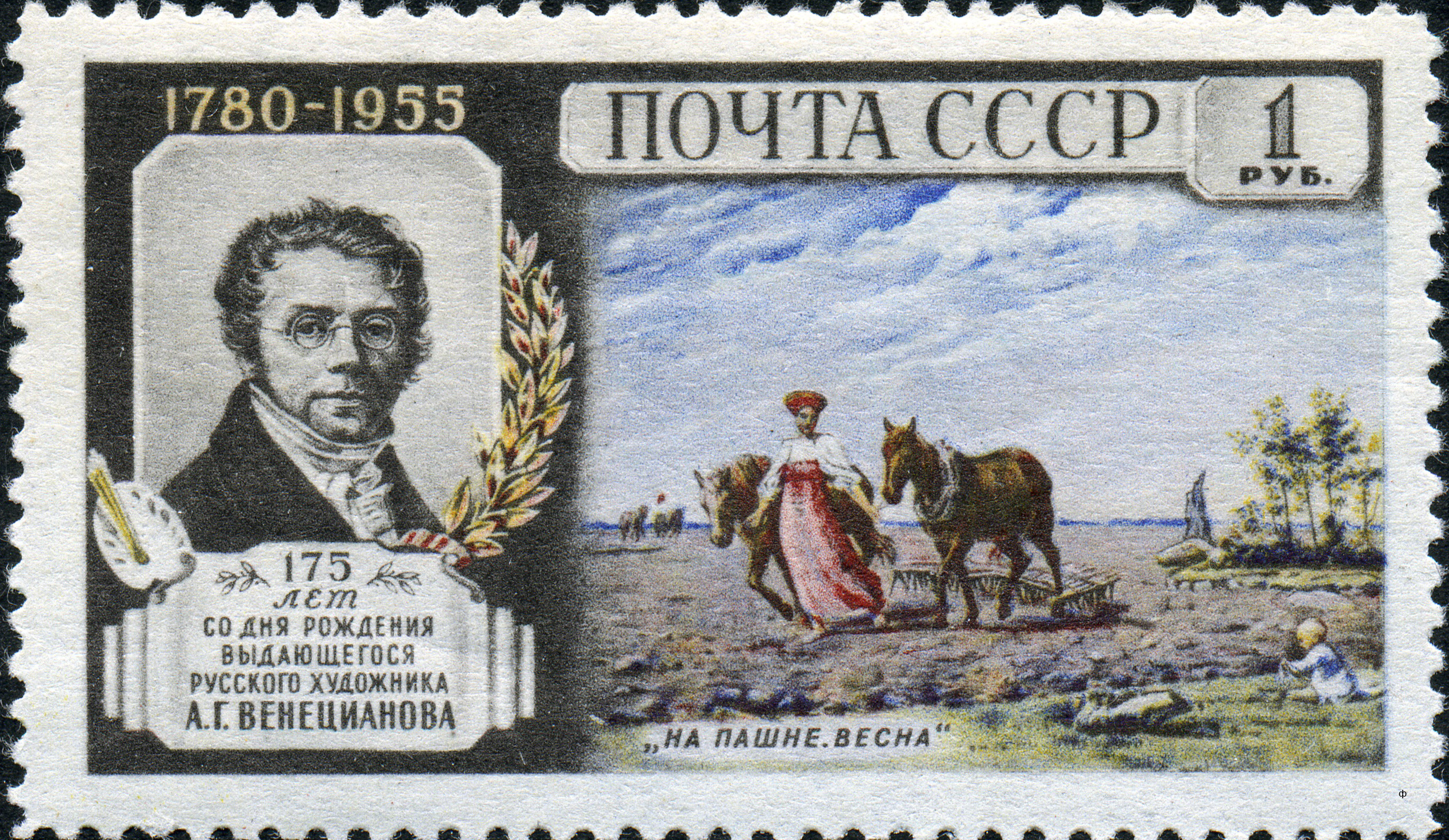 Марка СССР